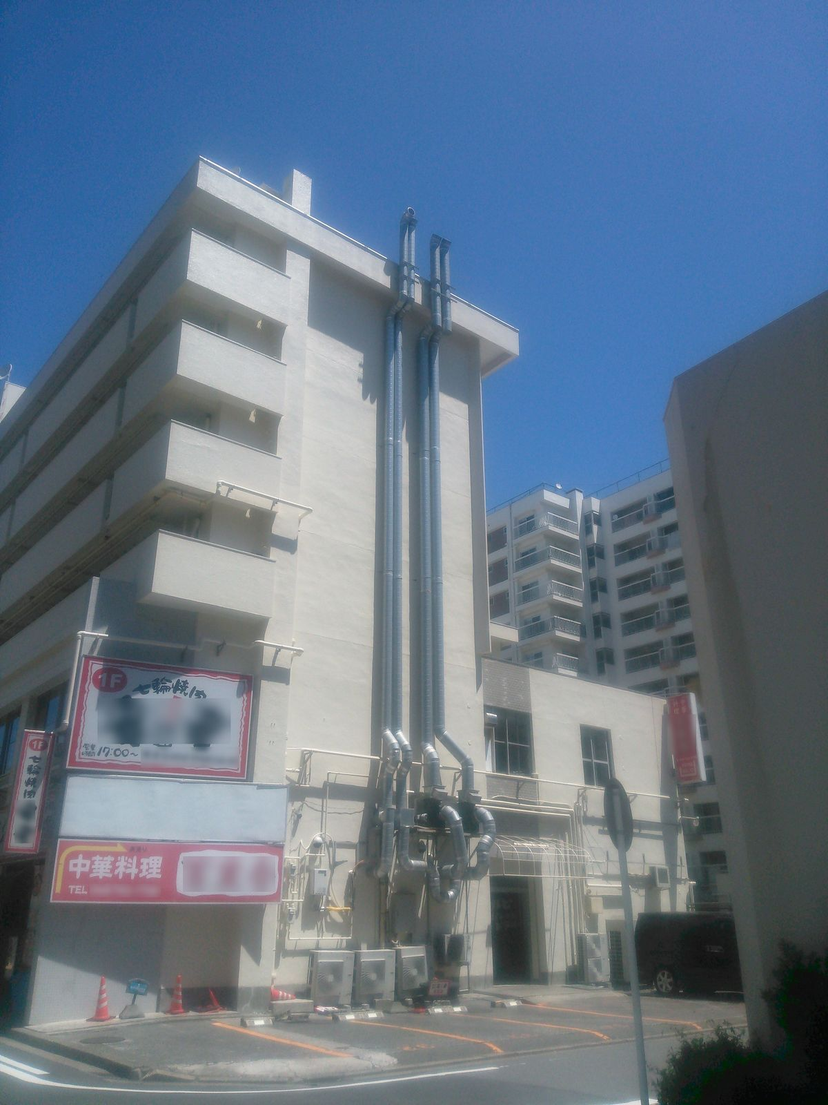 焼肉店の排煙ダクト